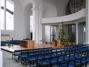 St.-Jakobus-Kirche in Mannheim-Neckarau.